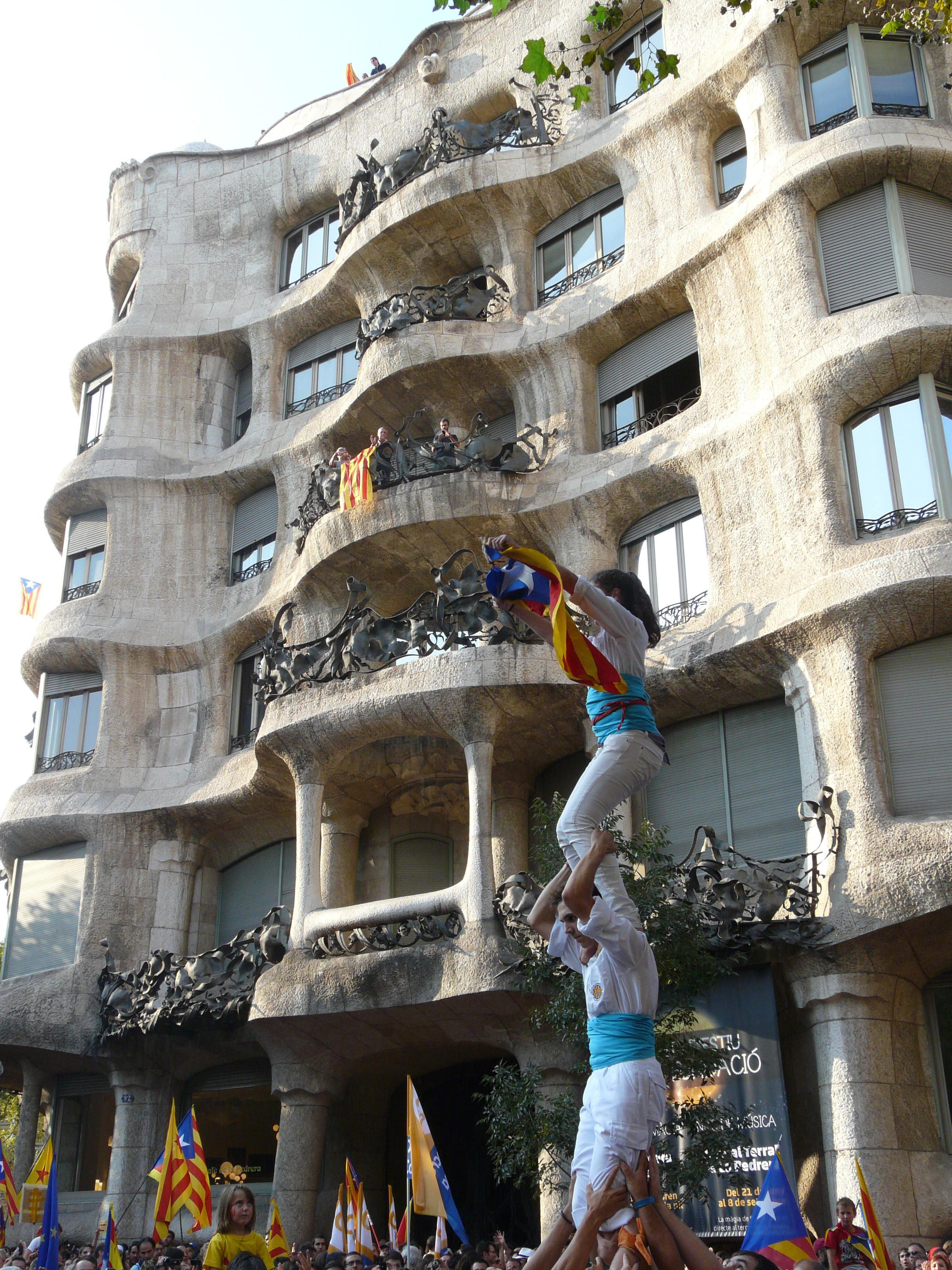 Casa Milà (Barcelona) Object location41° 23′ 43.01″ N, 2° 09′ 42.01″ E